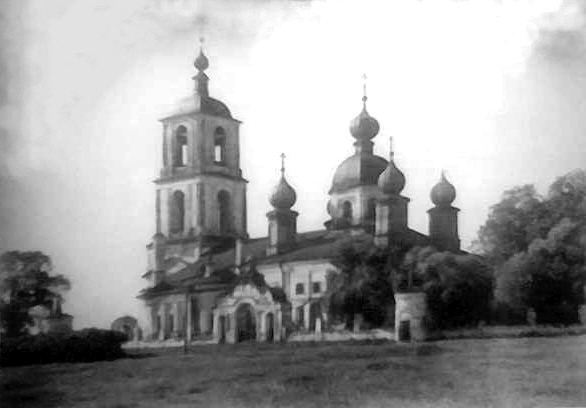 Аргуновский Никольский храм (Урочище Аргуново)